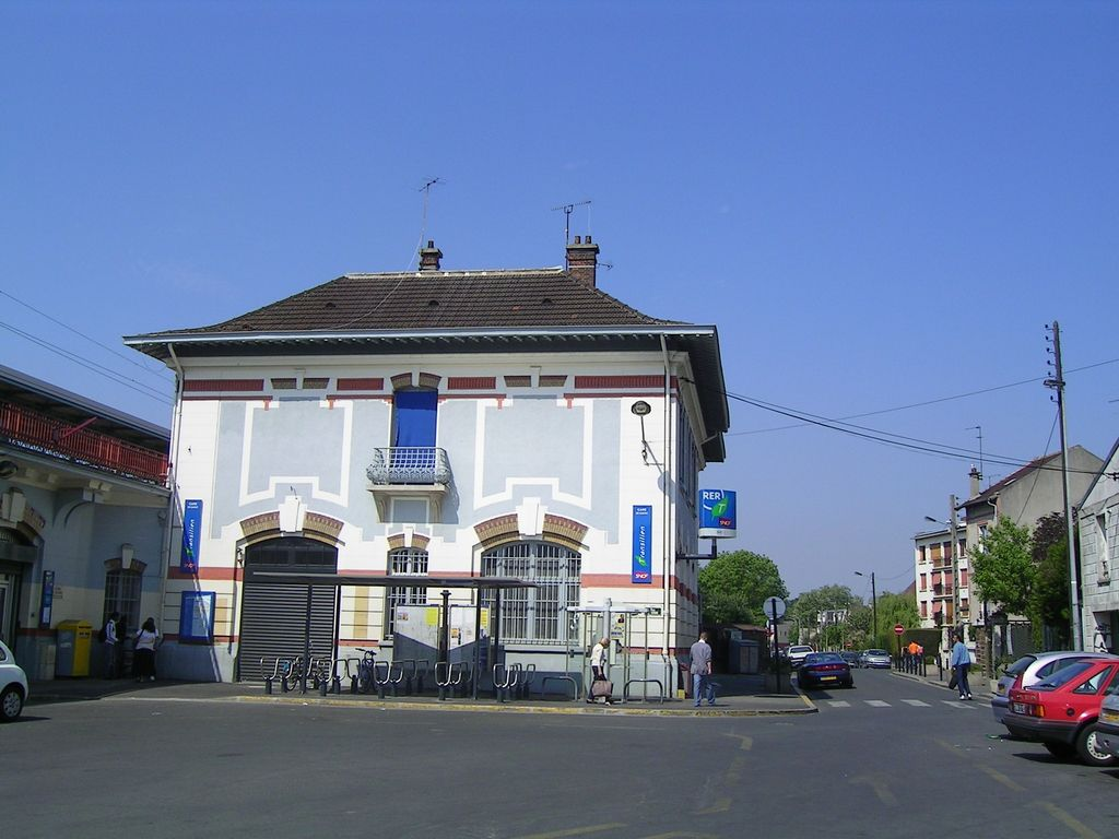 Gare, place de Verdun Photo personnelle (own work) de Marianna